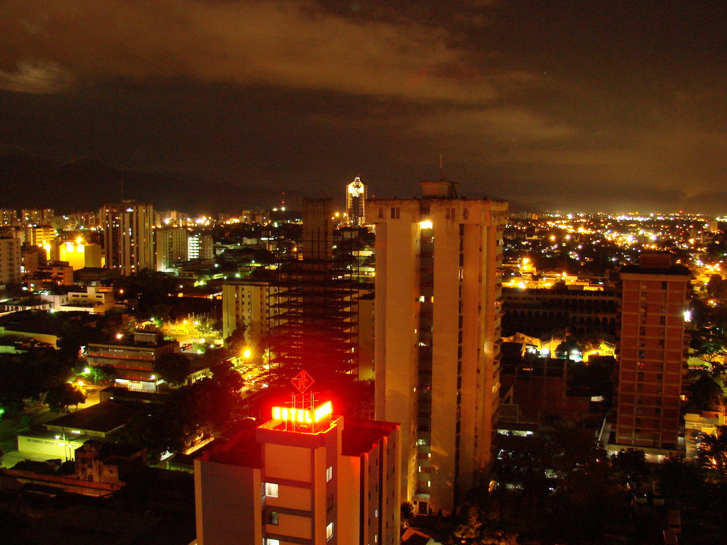 Maracay. Estado Aragua. Venezuela